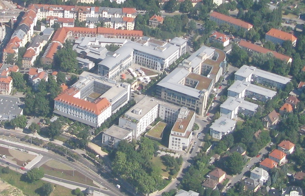 Waldschlösschen-Areal in Dresden mit dem Waldschlösschen (oben, Mitte)